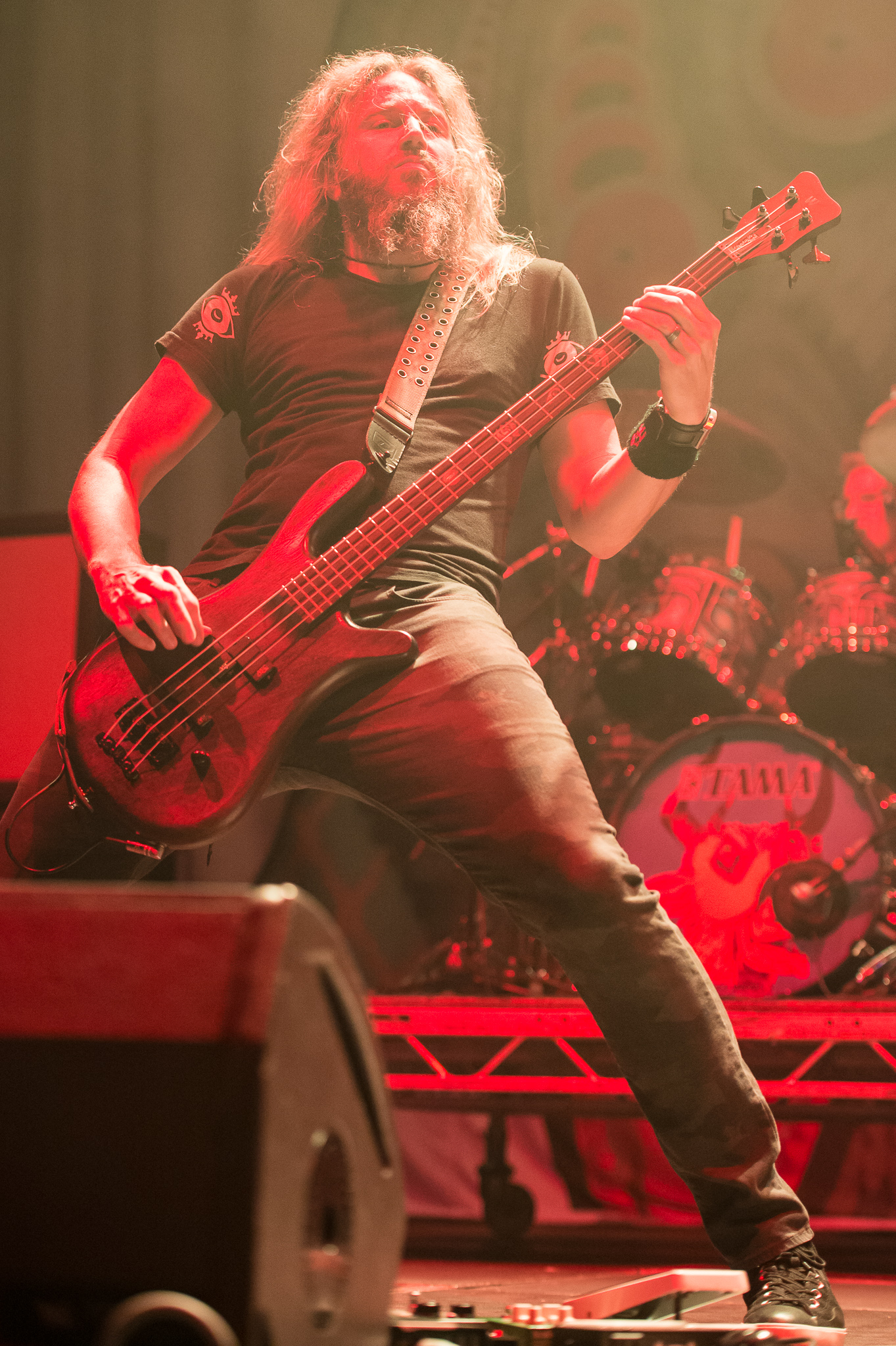 ARGO-Konzerte,Arena Nürnberger Versicherungen,Clubstage,Konzert,Livekonzert,Livemusik,Mastodon,Musik,RiP,Rock im Park 2014,Troy Sanders